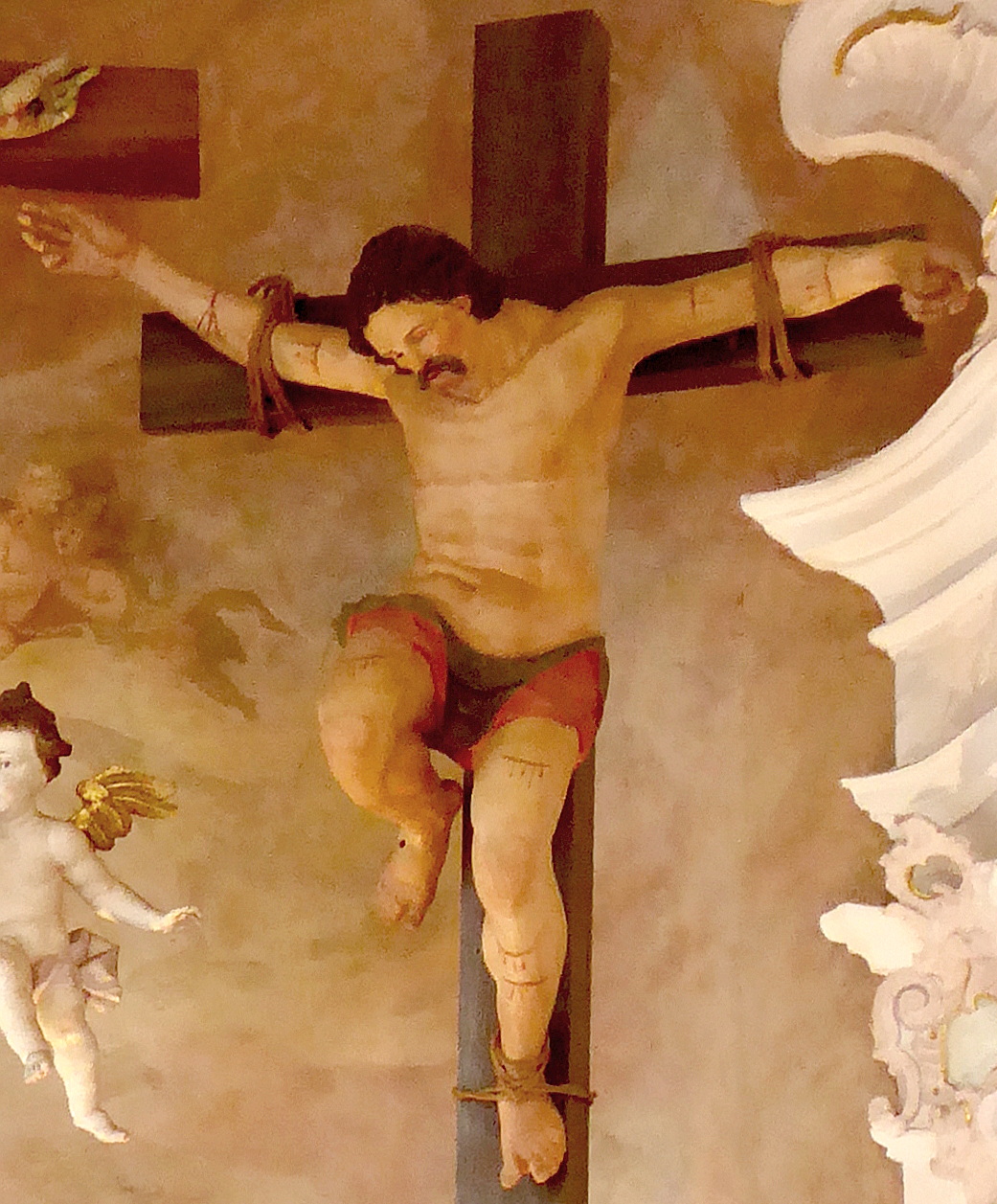 Der Schächer Gestas in der Wallfahrtskirche Heilig Kreuz Mindelaltheim.